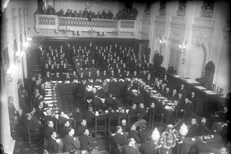 Zur Eröffnung der zweiten Haager Conferenz! ( Neueste Aufnamhnen unseres nach dort entsandten Sonder-Bildberichterstatters) Innenaufnahme der ersten Sitzung unter dem Vorsitz von Jaspar (Belgien) in der Kammer des Binnenhofes in Haag.